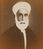 sharif Husein